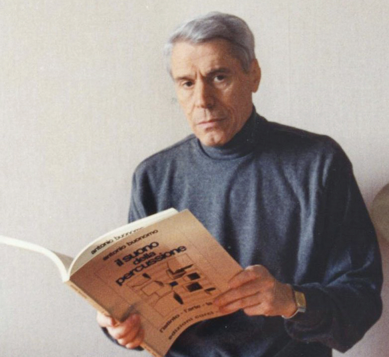 Antonio Buonomo con un suo libro